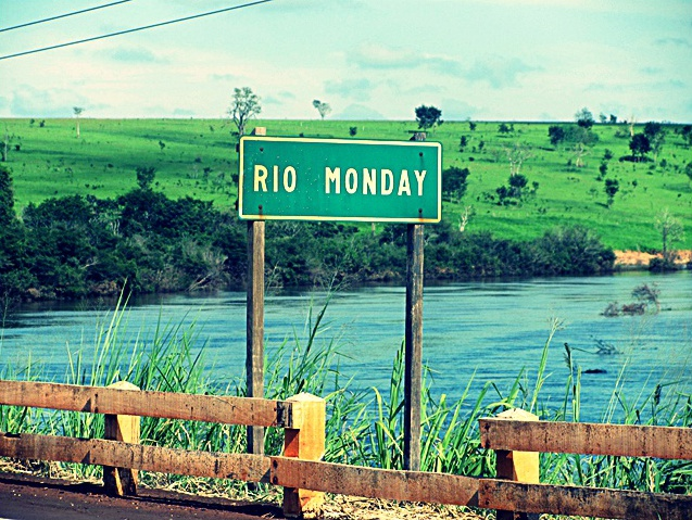 Río Monday en Paraguay